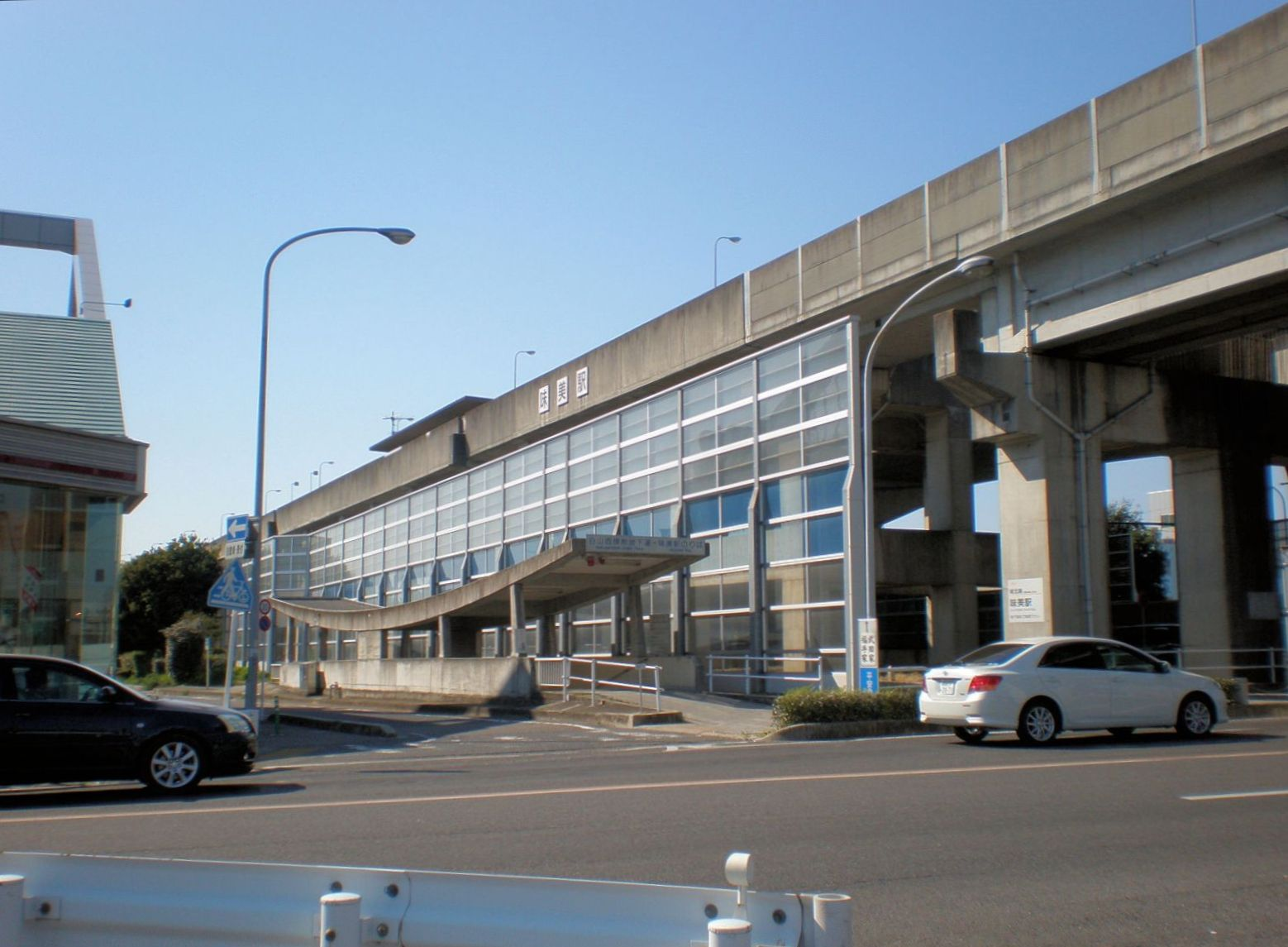 愛知県春日井市にある東海交通事業味美駅